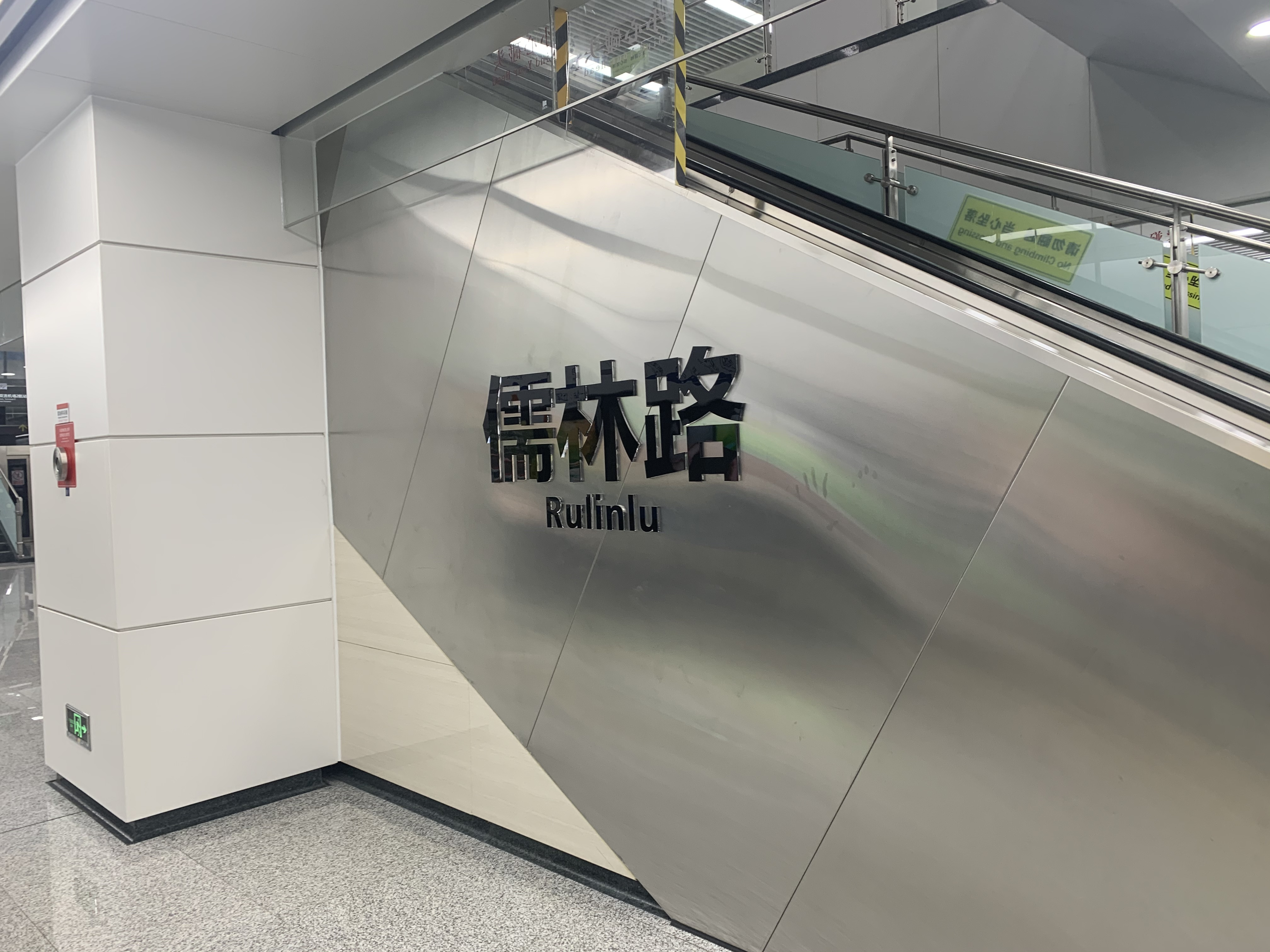 中文（中国大陆）: 成都地铁儒林路站站台大字壁